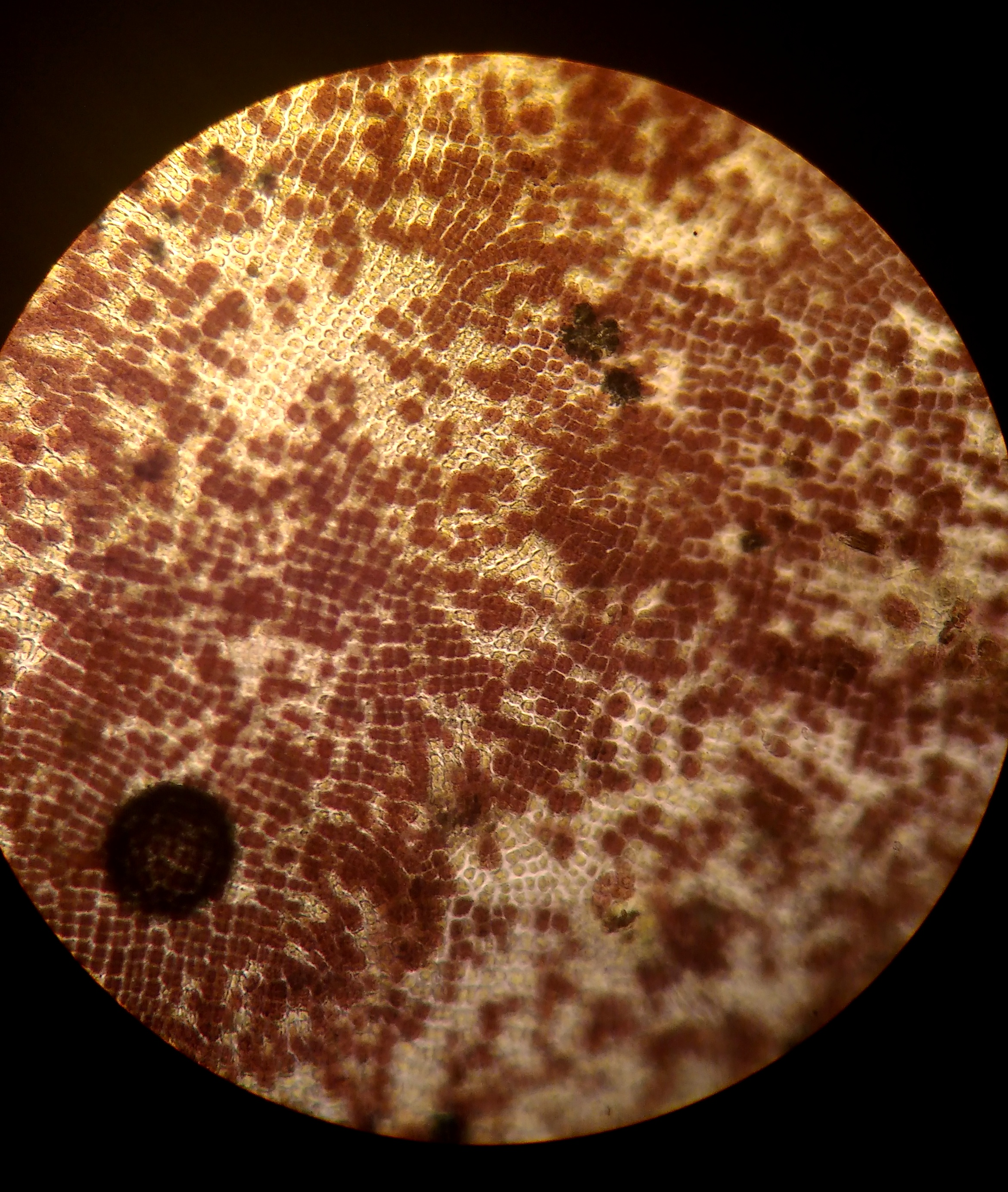 Porphyra en el microscópio óptico